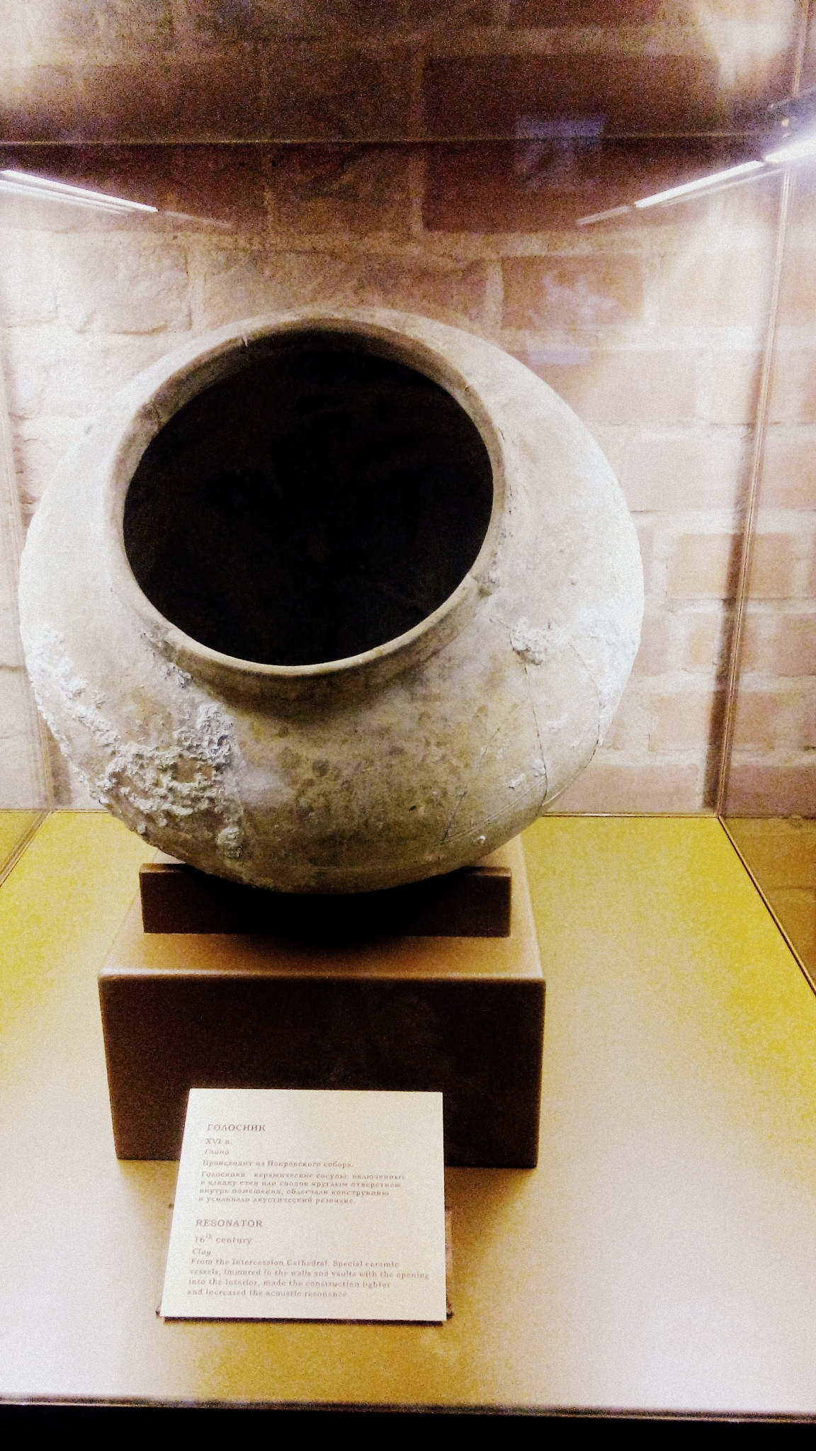 Собор Покрова Пресвятой Богородицы, что на Рву